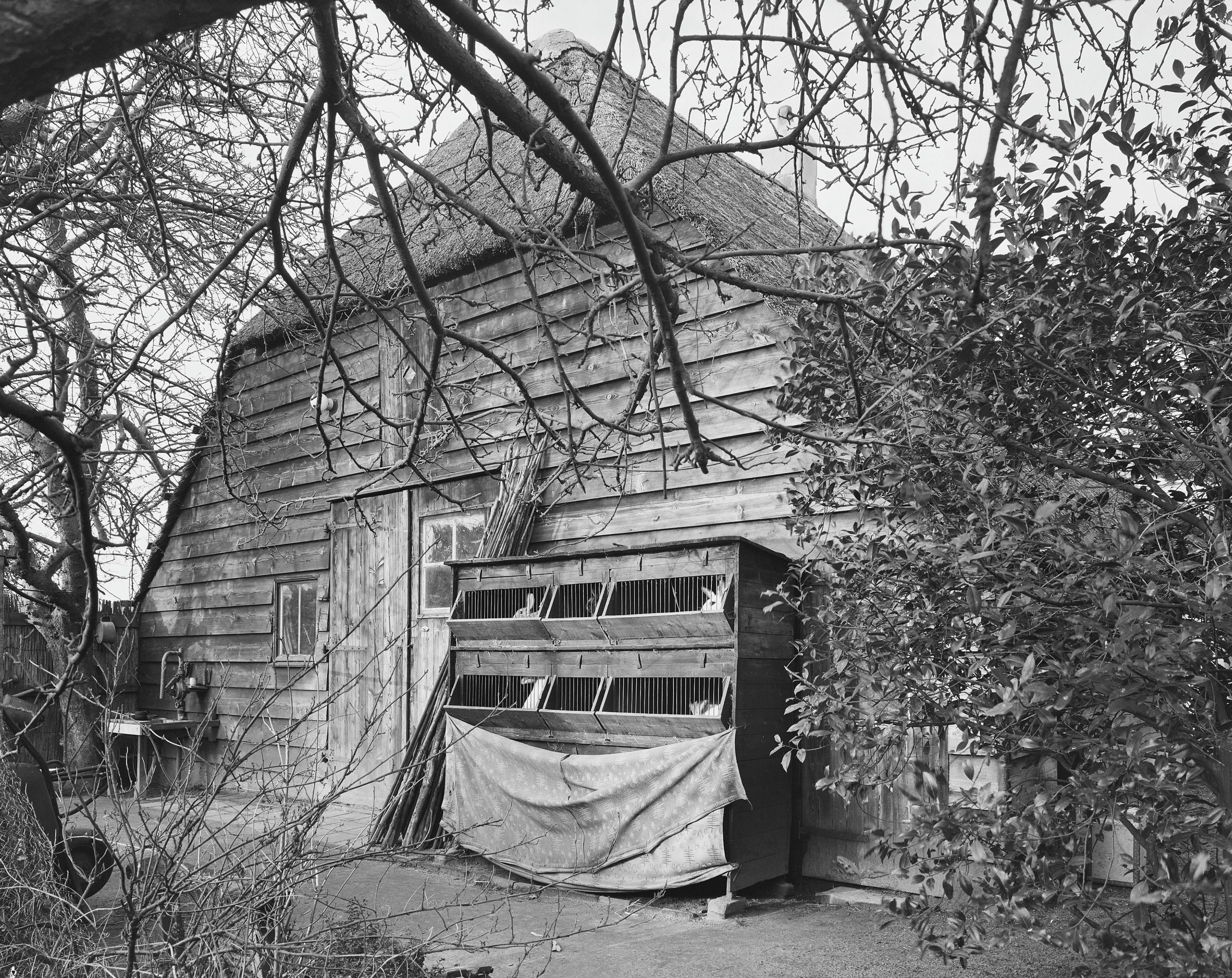 achtergevel